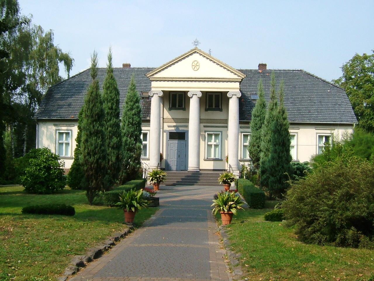 Neoklasycystyczna plebania przy kościele św. Mateusza w Opalenicy.